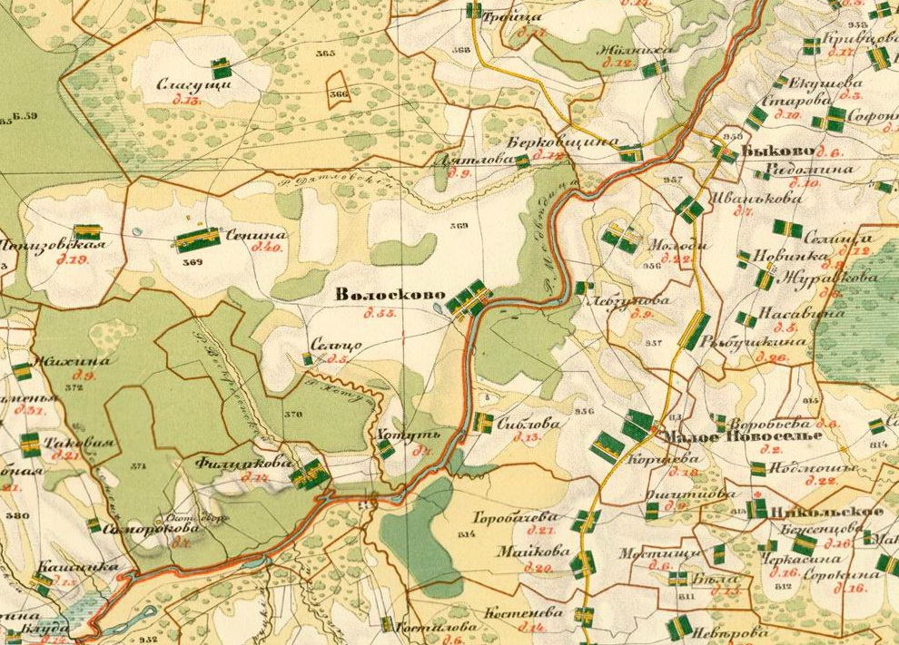 с.Волосково на карте середины XIX века